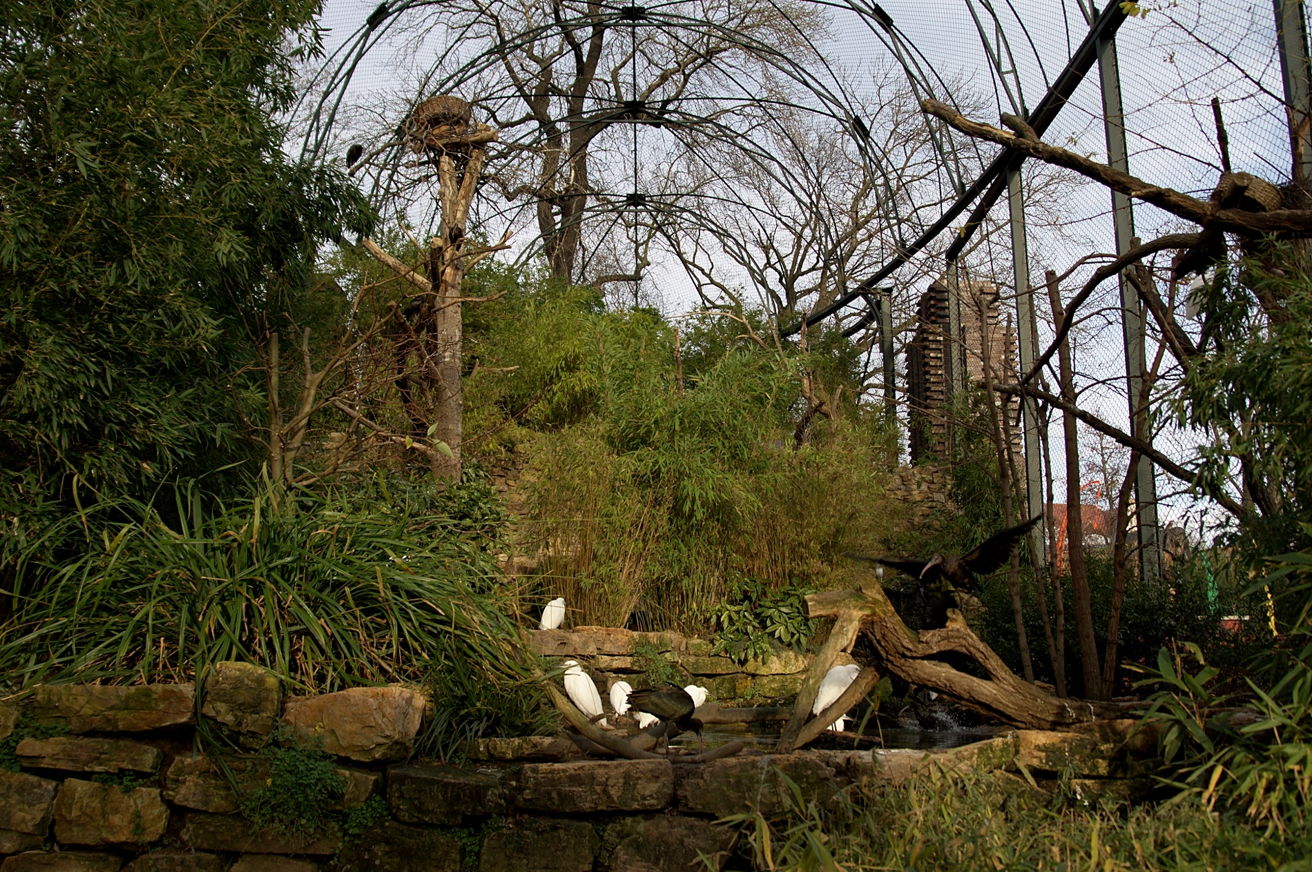 Innenansicht des begehbaren Flugkäfigs im Zoo Leipzig.